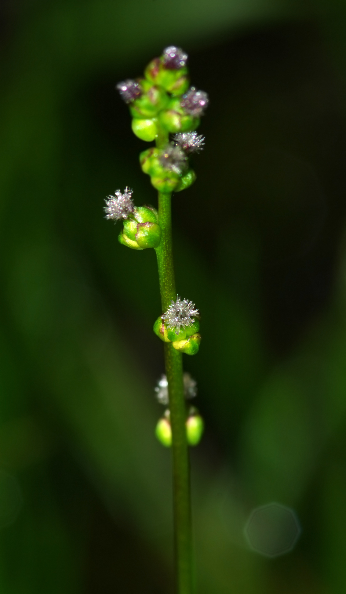 Świbka błotna (Triglochin palustris)